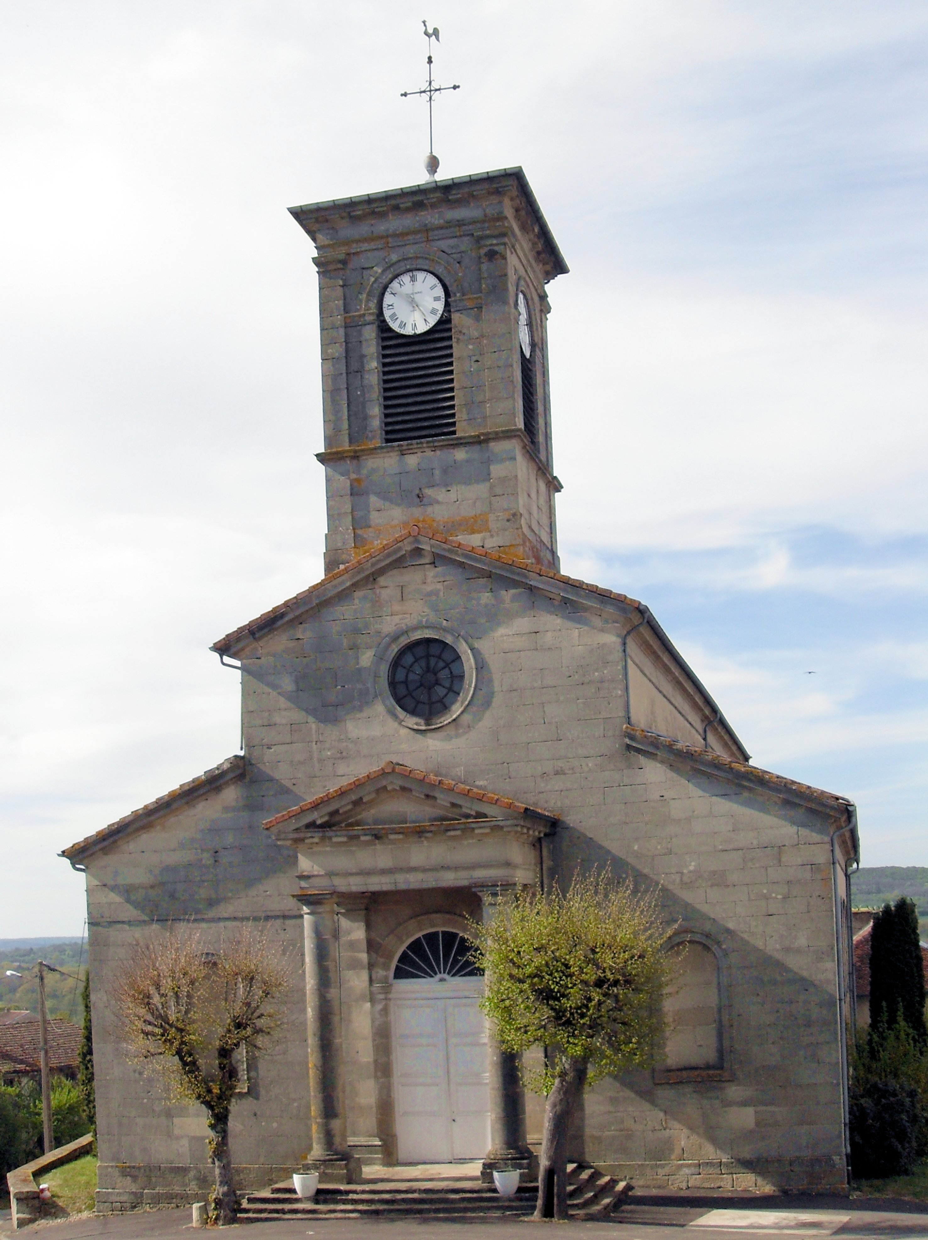 L'église Saint-Léger d'Enfonvelle, côté sud